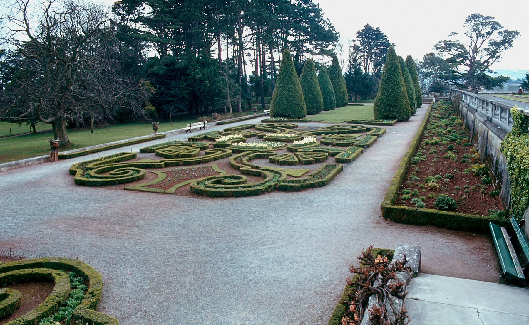 Oldway Mansion, Devon/UK; Gartenteil mit Buchsbaum-Ornamenten und Blumenbeeten